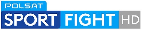 Logo kanału sportowego Polsatu